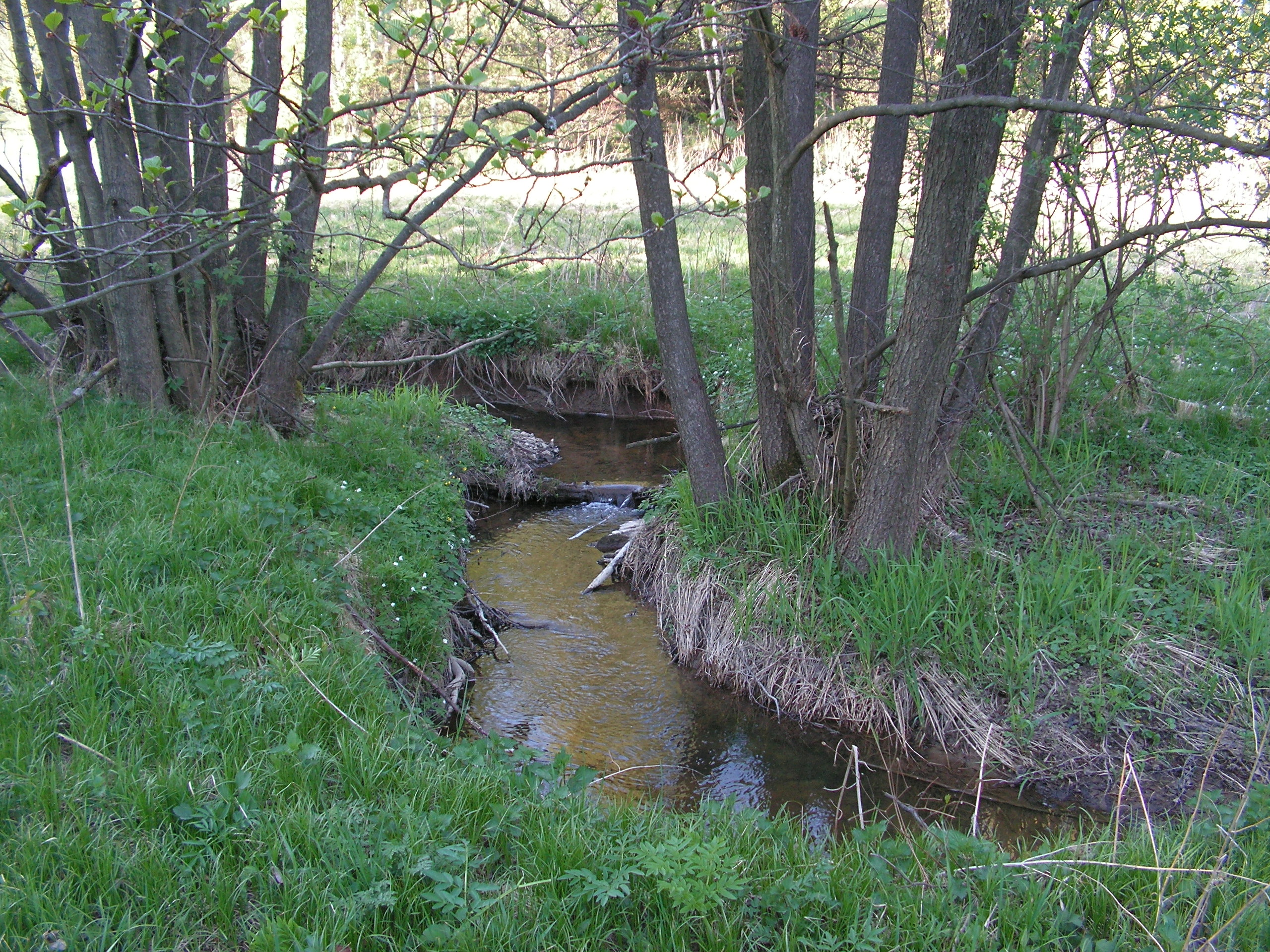 Olešenský potok pod Hostkovicemi.